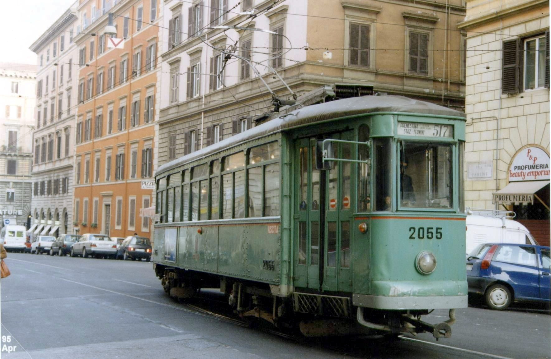 Vettura tranviaria MRS 2055 dell'ATAC di Roma, sulla linea 517 (ex 12/)